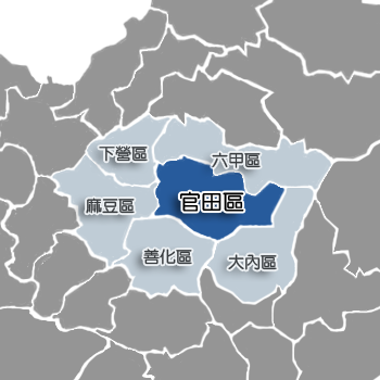 官田區相對位置